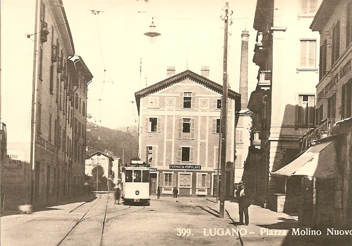 Tram der Strassenbahn Lugano in der Ausweichstelle Piazza Molino Nuovo